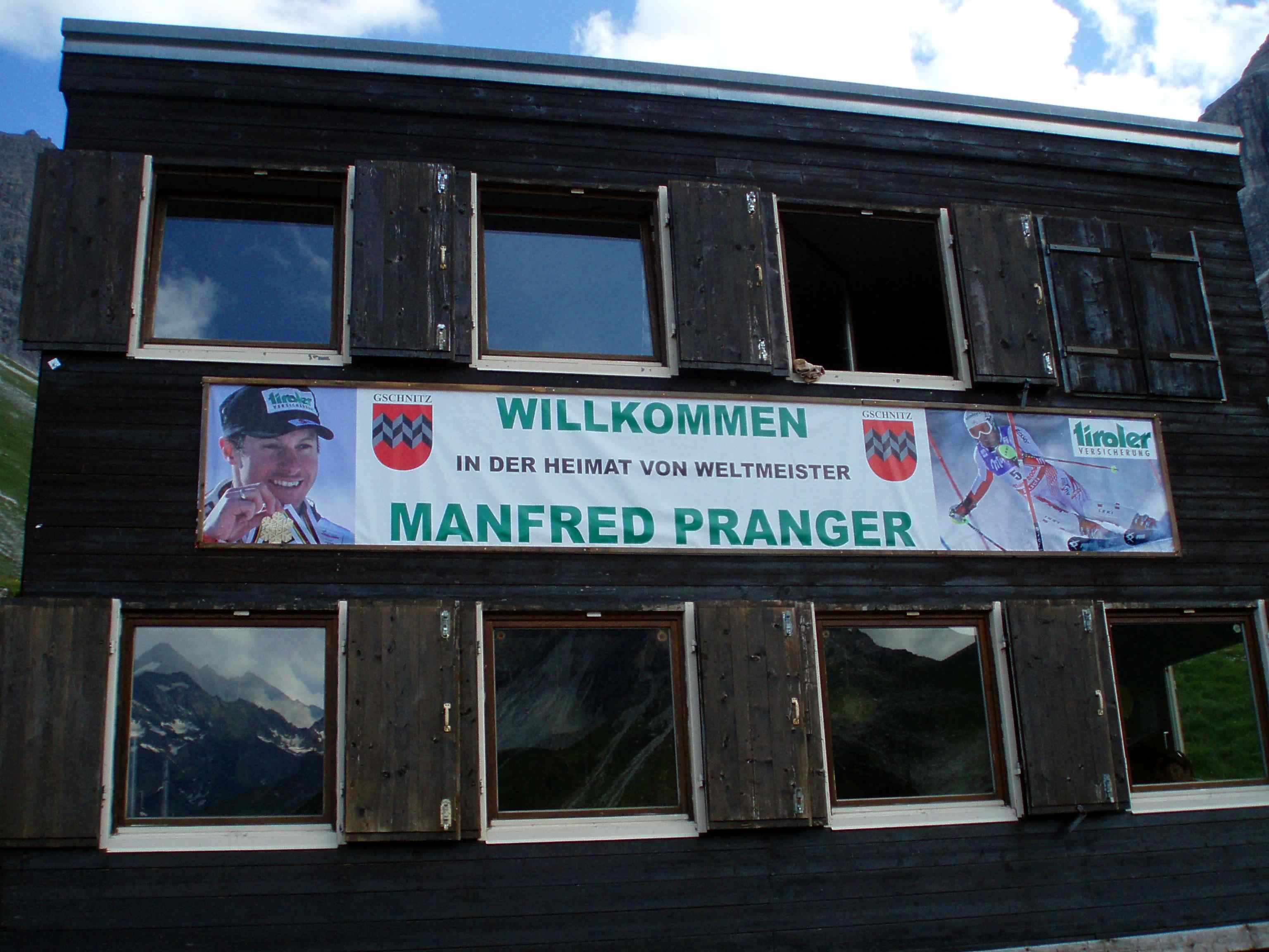 Heimat von Manfred Pranger